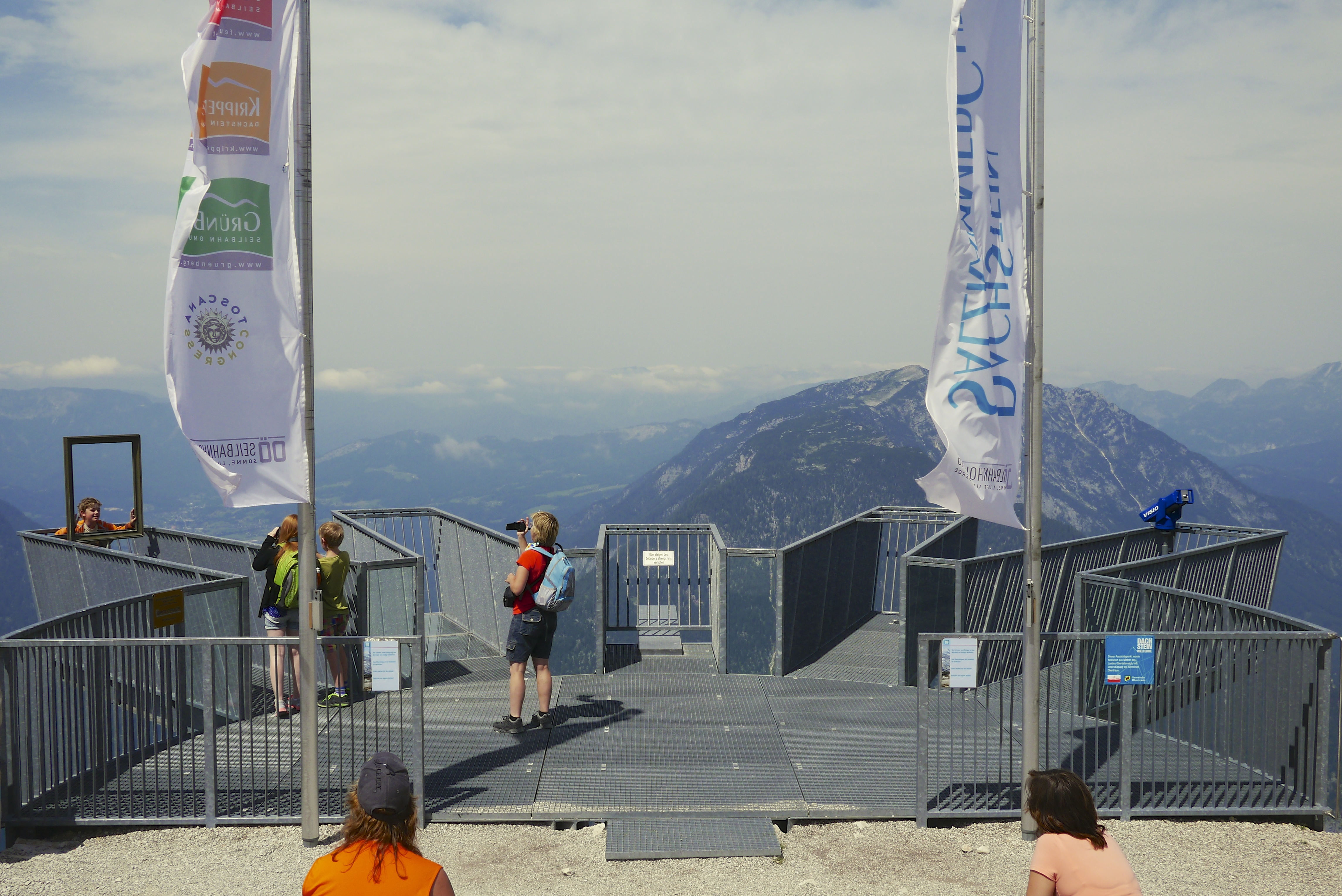 Die Aussichtsplattform 5 fingers (Fünf Finger) am Krippenstein